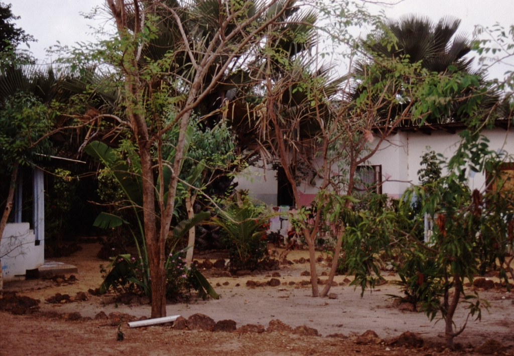 Auf „Monikas Campinplatz“ in Sukuta